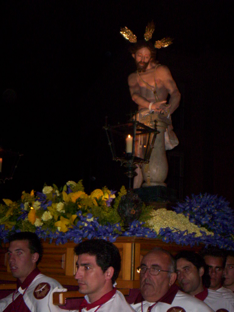 Procesión del Espiritu Santo 2007